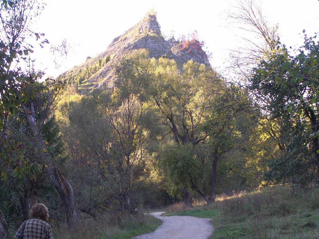 Rezerwat Biała Woda (Pieniny)